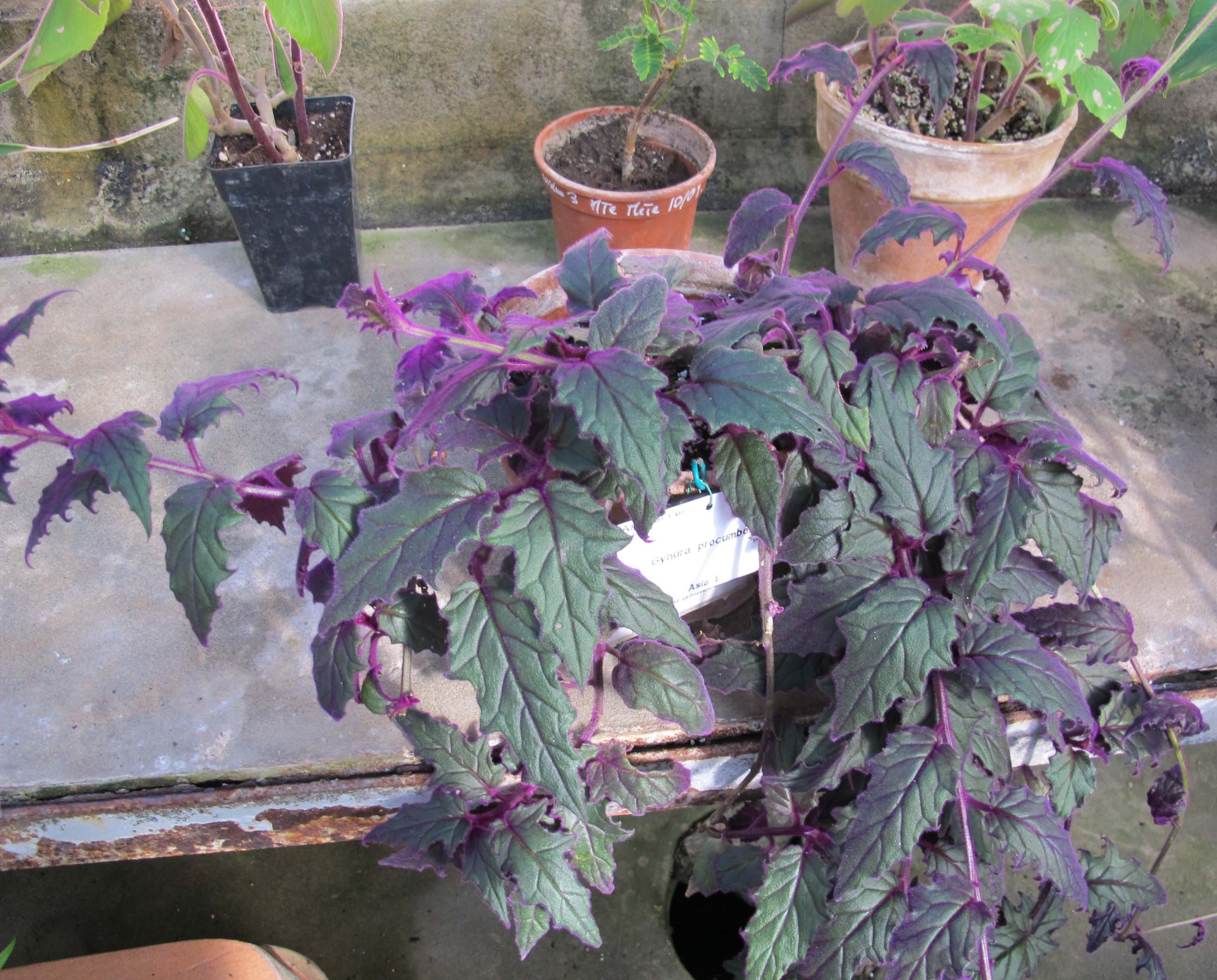 Giardino dei semplici, gynura aurantiaca procubens